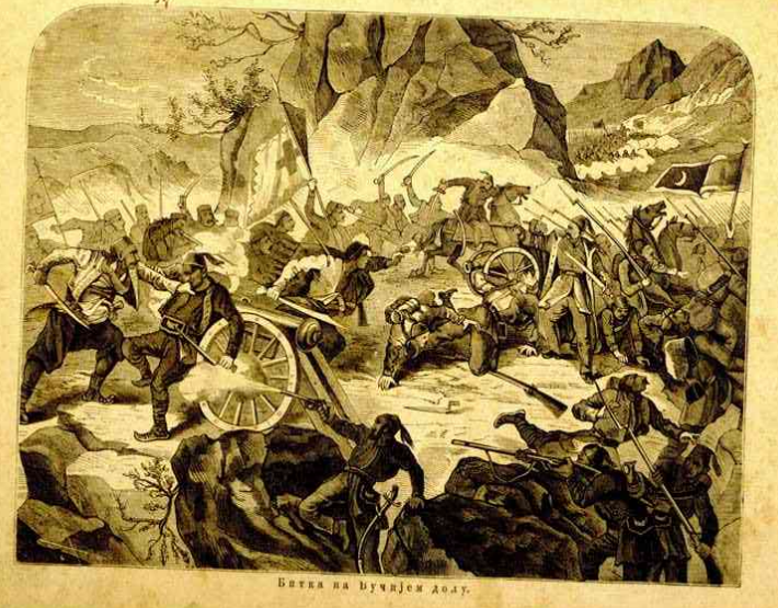 Bitka na Vučijem Dolu. Ilustracija iz ilustrovanog časopisa „Orao“ za 1877. g.